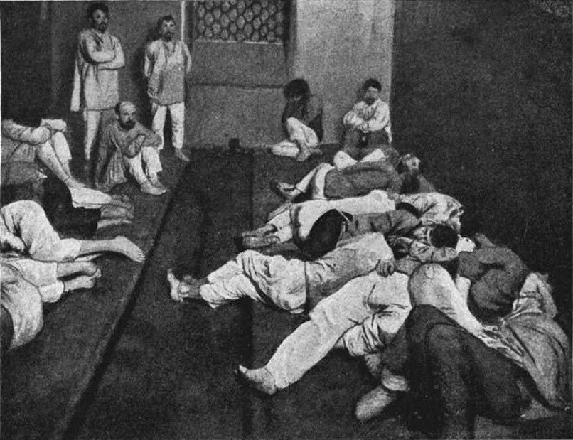 Камера для вытрезвления при Московской части (г. Петербурга). Из снимков д-ра Мендельсона.